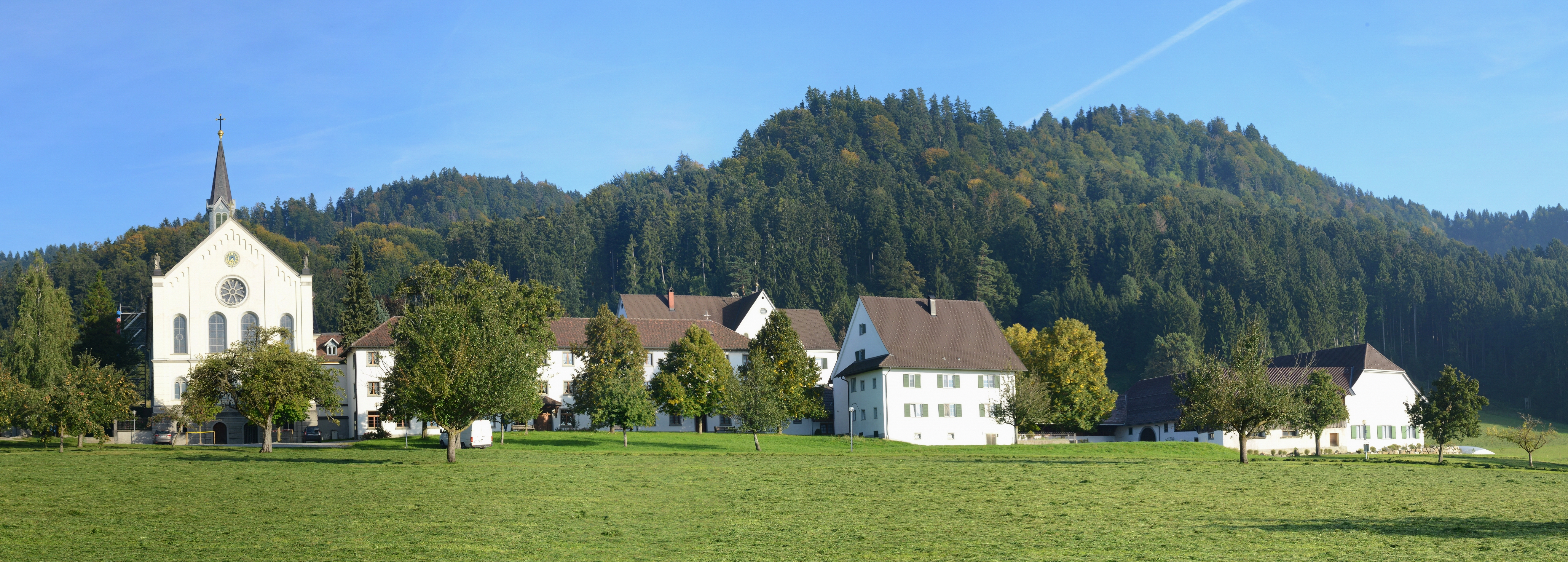 Zisterzienserinnenabtei Mariastern Kloster Maria Stern - Gwiggen in Hohenweiler, Vorarlberg. NOTE: This image is a panorama consisting of multiple frames that were merged or stitched in software. As a result, this image necessarily underwent some form of digital manipulation. These manipulations may include blending, blurring, cloning, and color and perspective adjustments. As a result of these adjustments, the image content may be slightly different than reality at the points where multiple images were combined. This manipulation is often required due to lens, perspective, and parallax distortions.